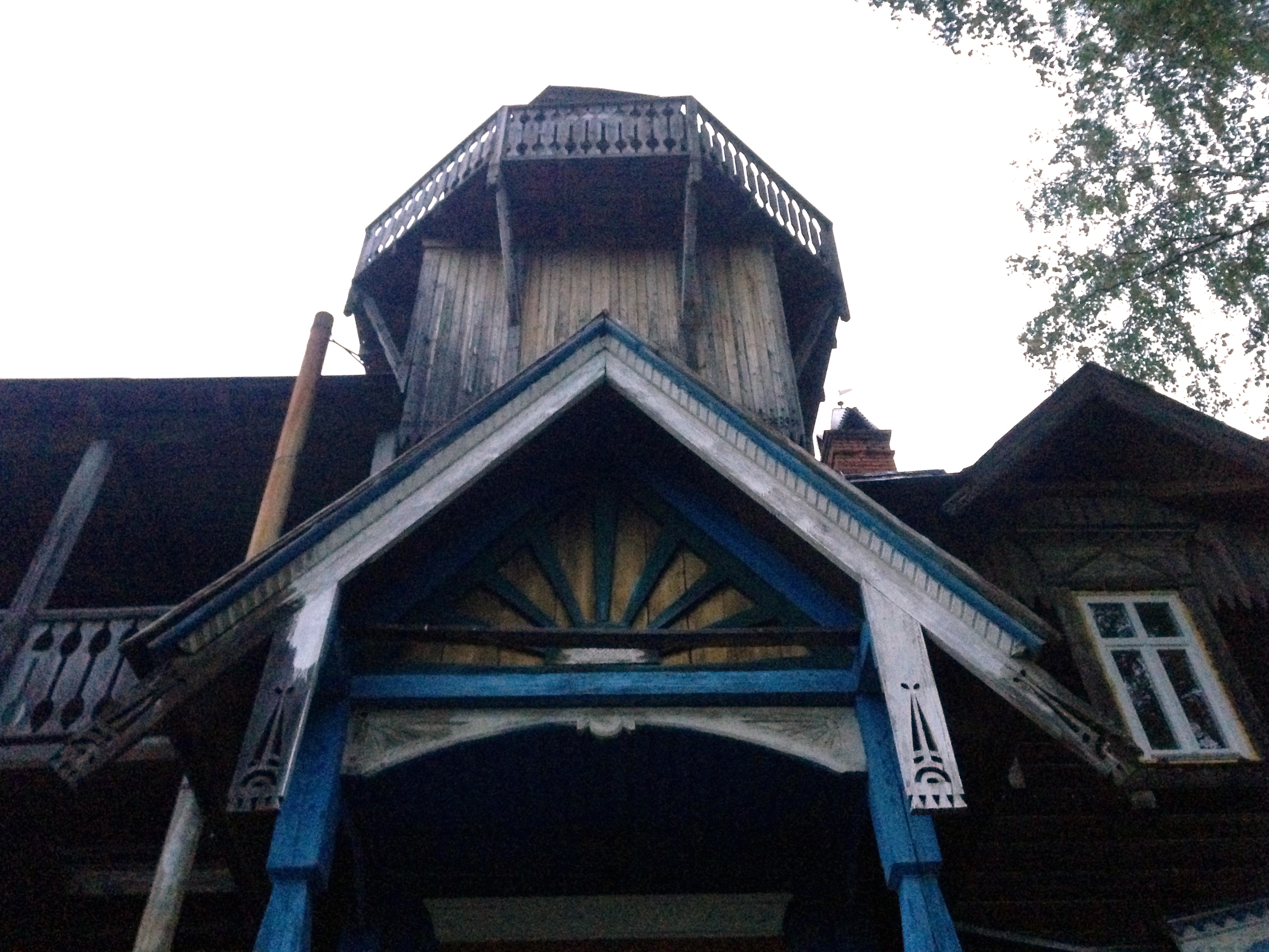 русский стиль, модерн, элементы избы: полотенца, "розетка полусолнца", причелины